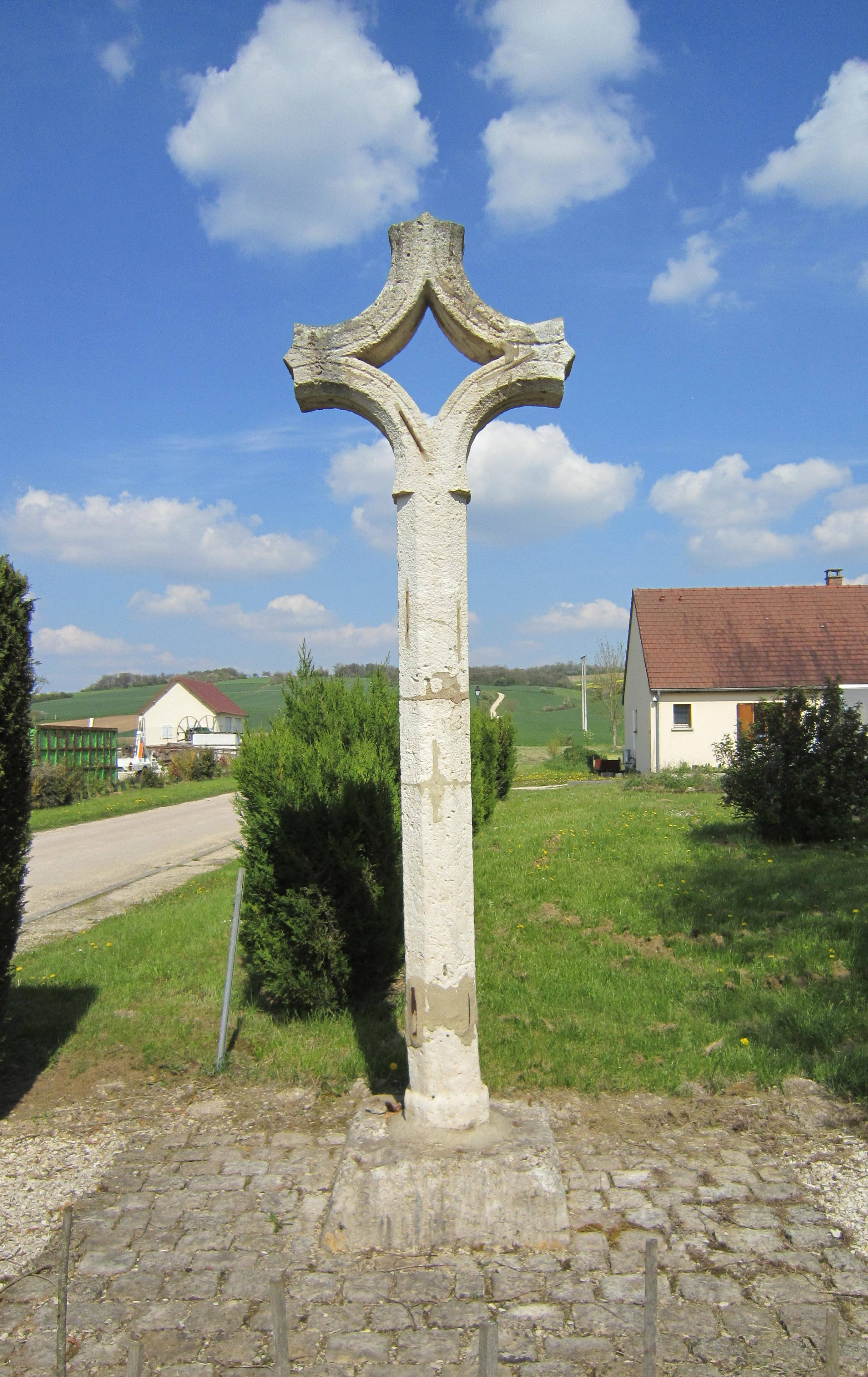 Croix percée de Charrey-sur-Seine (Côte-d'Or)